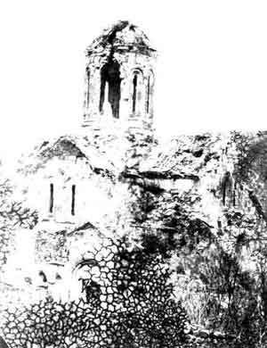 Грузинская Бетания